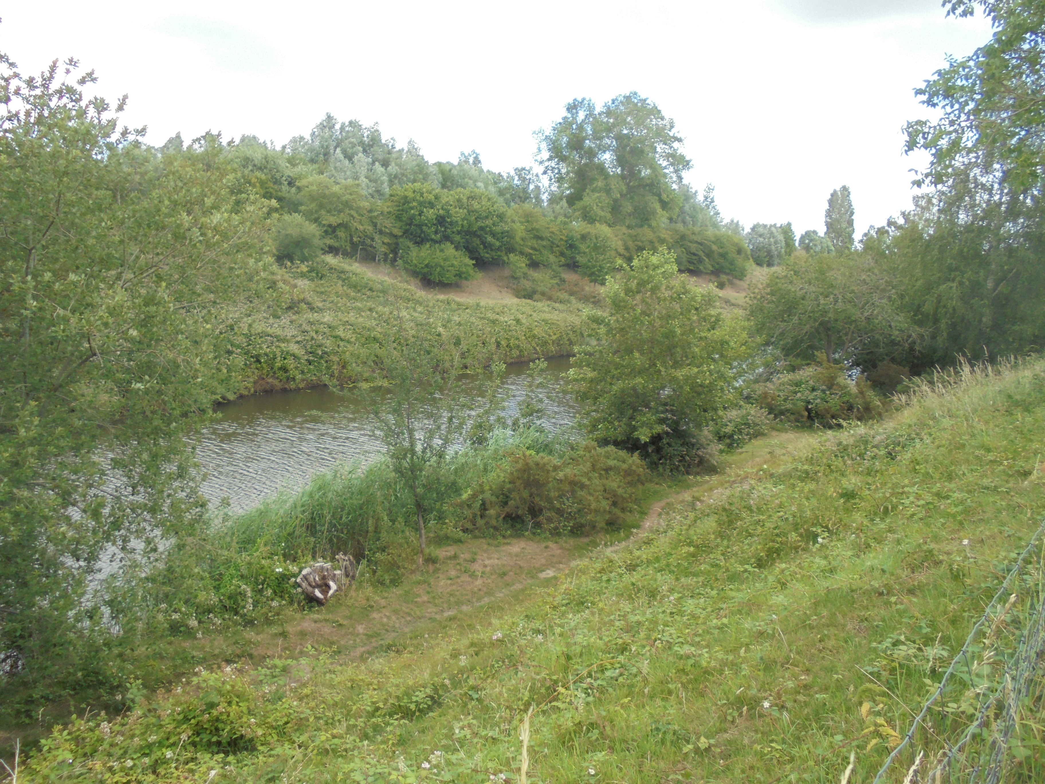 De Miseriebocht - Vaart-Zuid - Sint-Joris - Beernem - West-Vlaanderen - België. Een afgesneden arm van het Kanaal Gent-Brugge-Oostende.